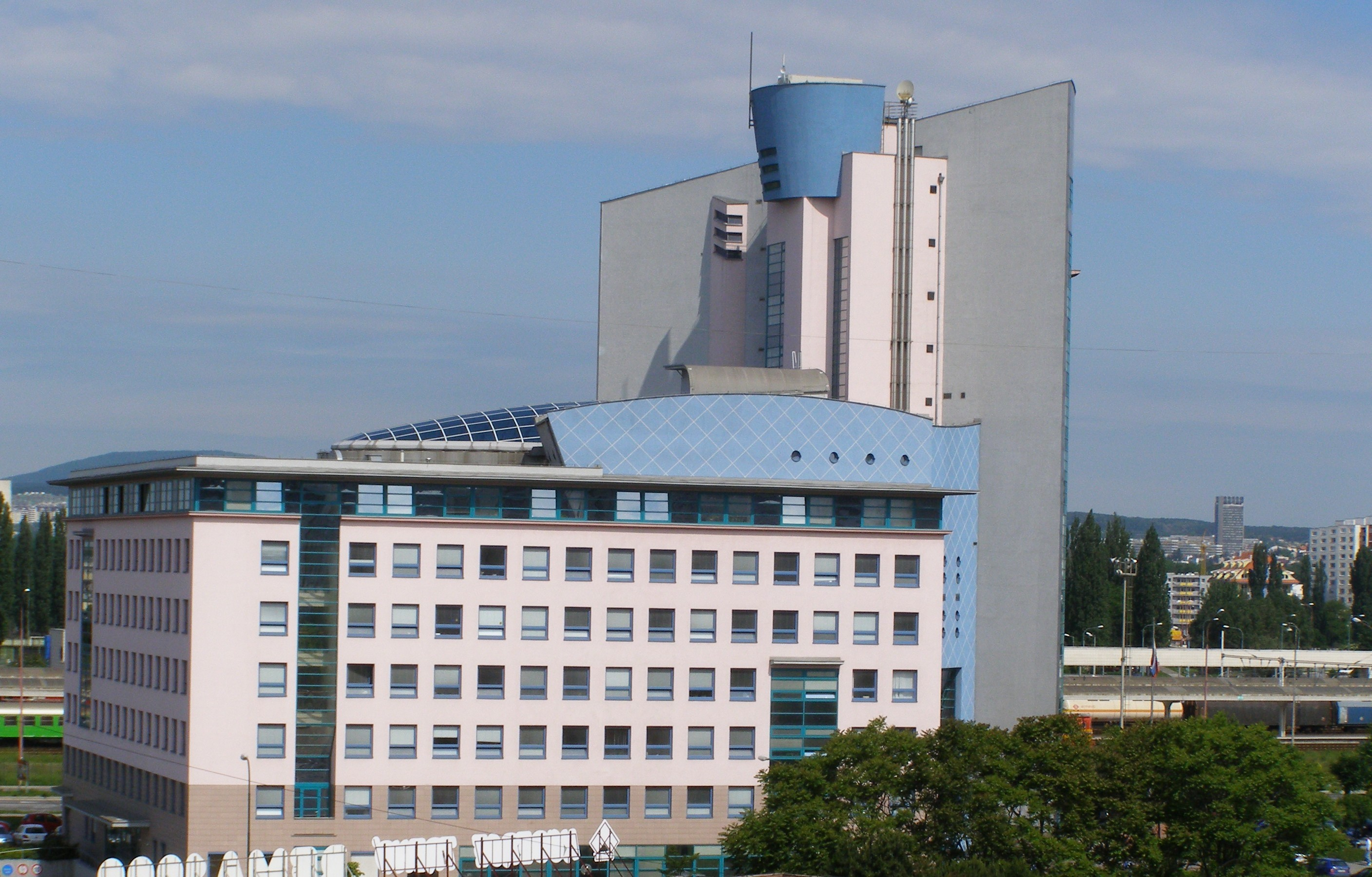 Daňový úrad (Tax Office), Petržalka, Bratislava